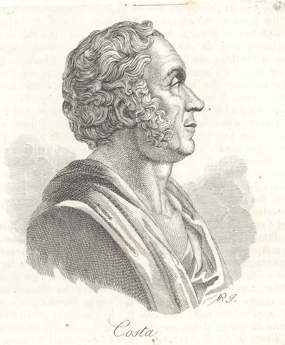 autore sconosciuto, riproduzione da stampa ottocentesca, ritratto di Paolo Costa, opera il cui autore è morto da più di 70 anni, acquisita da scanner